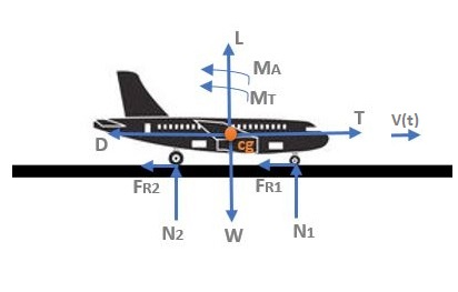 Aeronave rodando en el suelo. Fuerzas que intervienen